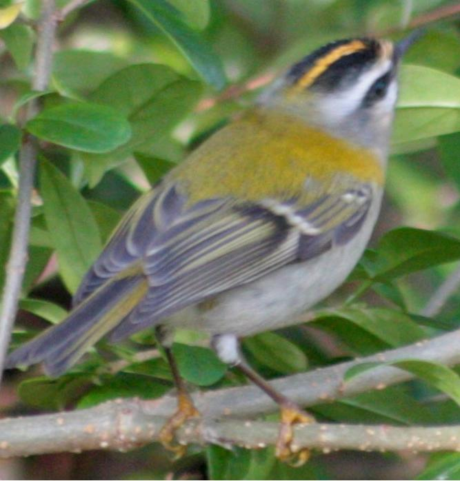 Regulus ignicapillus roitelet triple bandeau